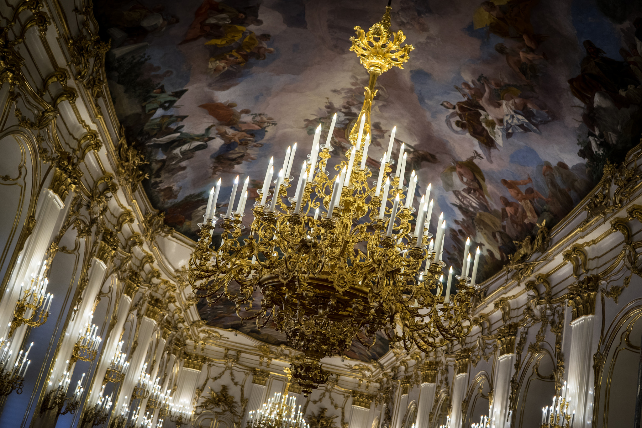 500px provided description: Vienna [#Schloss ,#Vienna ,#Wien ,#Sch?nbrunn ,#Habsburger]